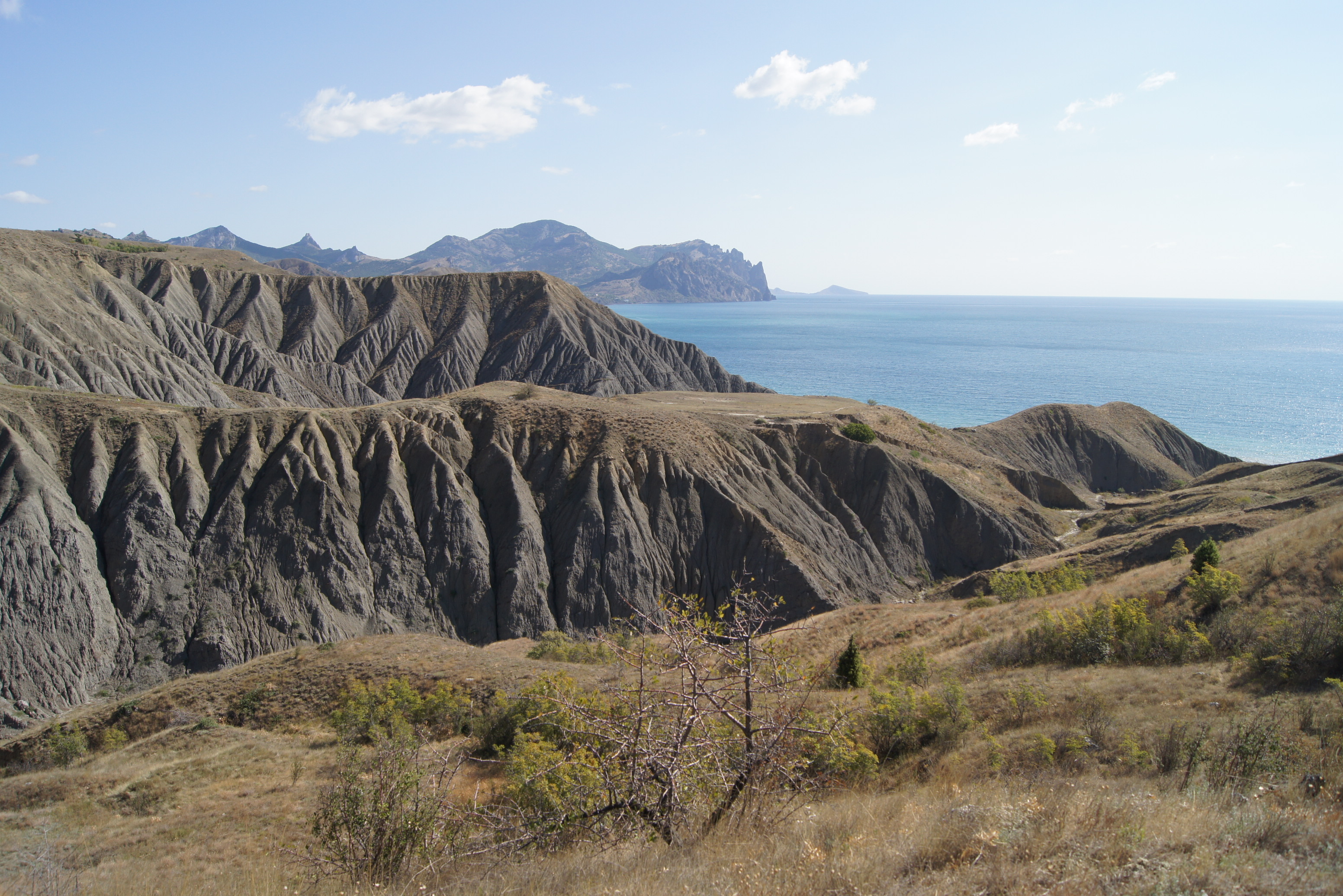 «Лисяча бухта Ечкі-Даг», м. Судак, м. Феодосія